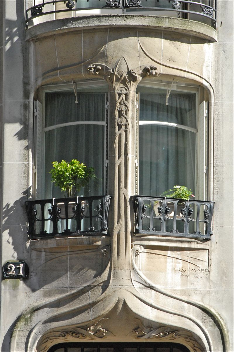 Eléments de décor d'un immmeuble art nouveau conçu par Hector Guimard à Paris, 21 rue la Fontaine. Ensemble d'immeubles rue la Fontaine et rue Agar à Paris conçus par Hector Guimard en 1910-1912.